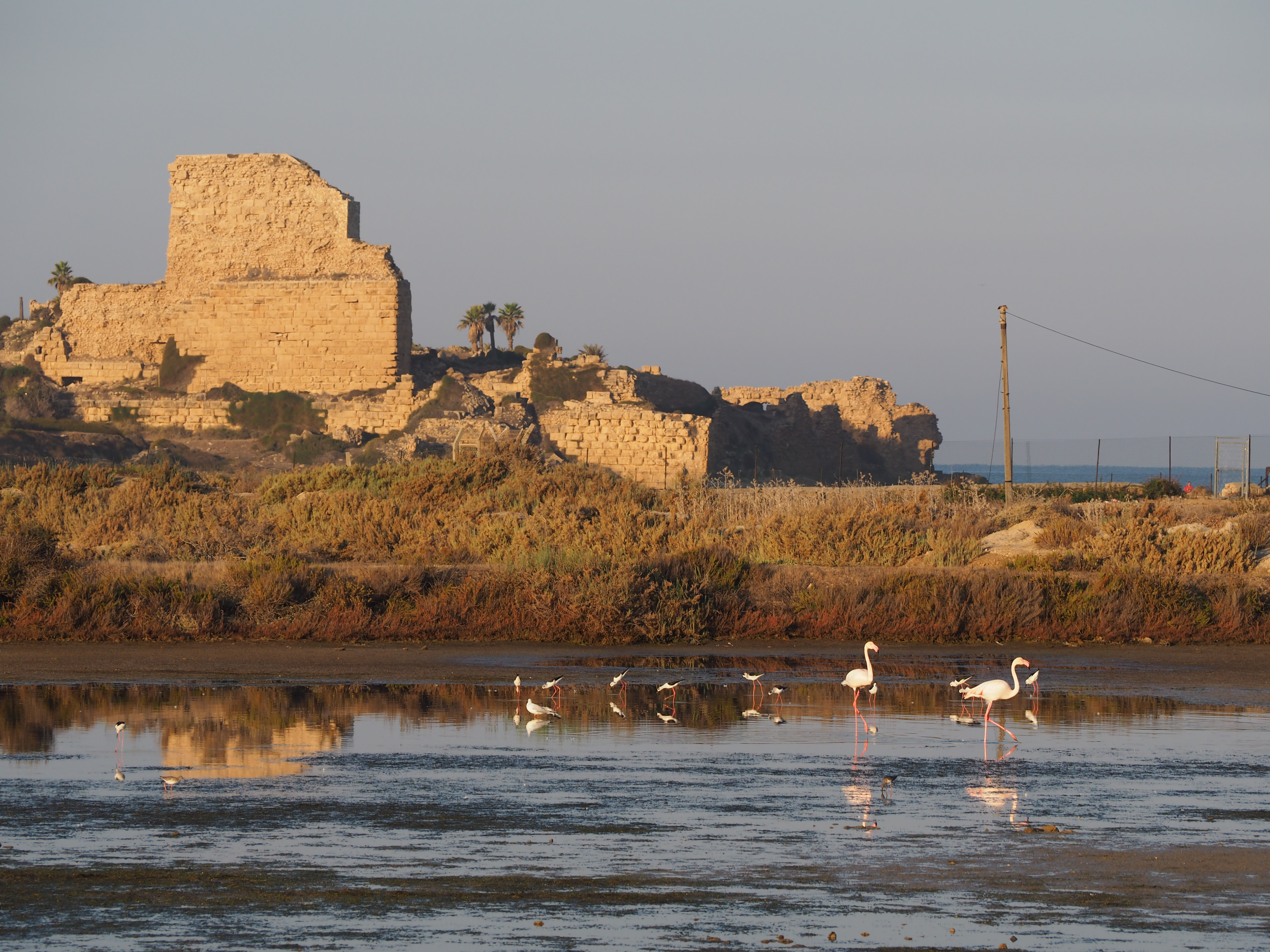 מבצר עתלית (ידוע גם כמבצר פרגרינורום (Castellum peregrinorum) או טירת פֶּלֶרֶן (Château Pèlerin)) הוא אתר ארכאולוגי ובו מבצר צלבני. האתר נמצא סמוך ליישוב עתלית שבמישור החוף, והוא היה מקום מושבם של אחרוני הצלבנים בארץ ישראל, לפני שנטשו את ממלכתם והפליגו אל מעבר לים.